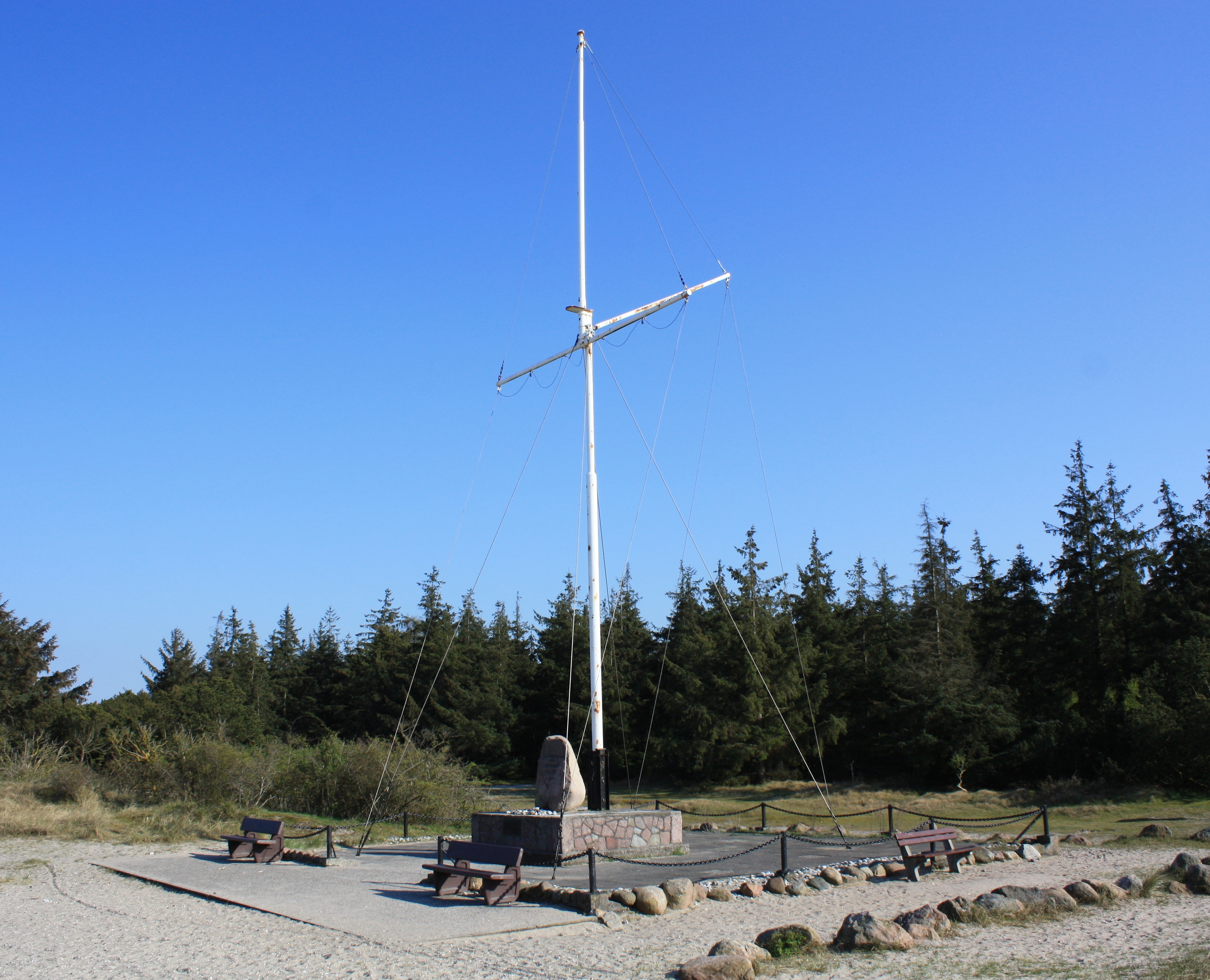 Denkmal zur Erinnerung an die Opfer des Untergangs des Schulschiffes "Niobe". Es befindet sich am Strand bei Gammendorf auf der Insel Fehmarn.